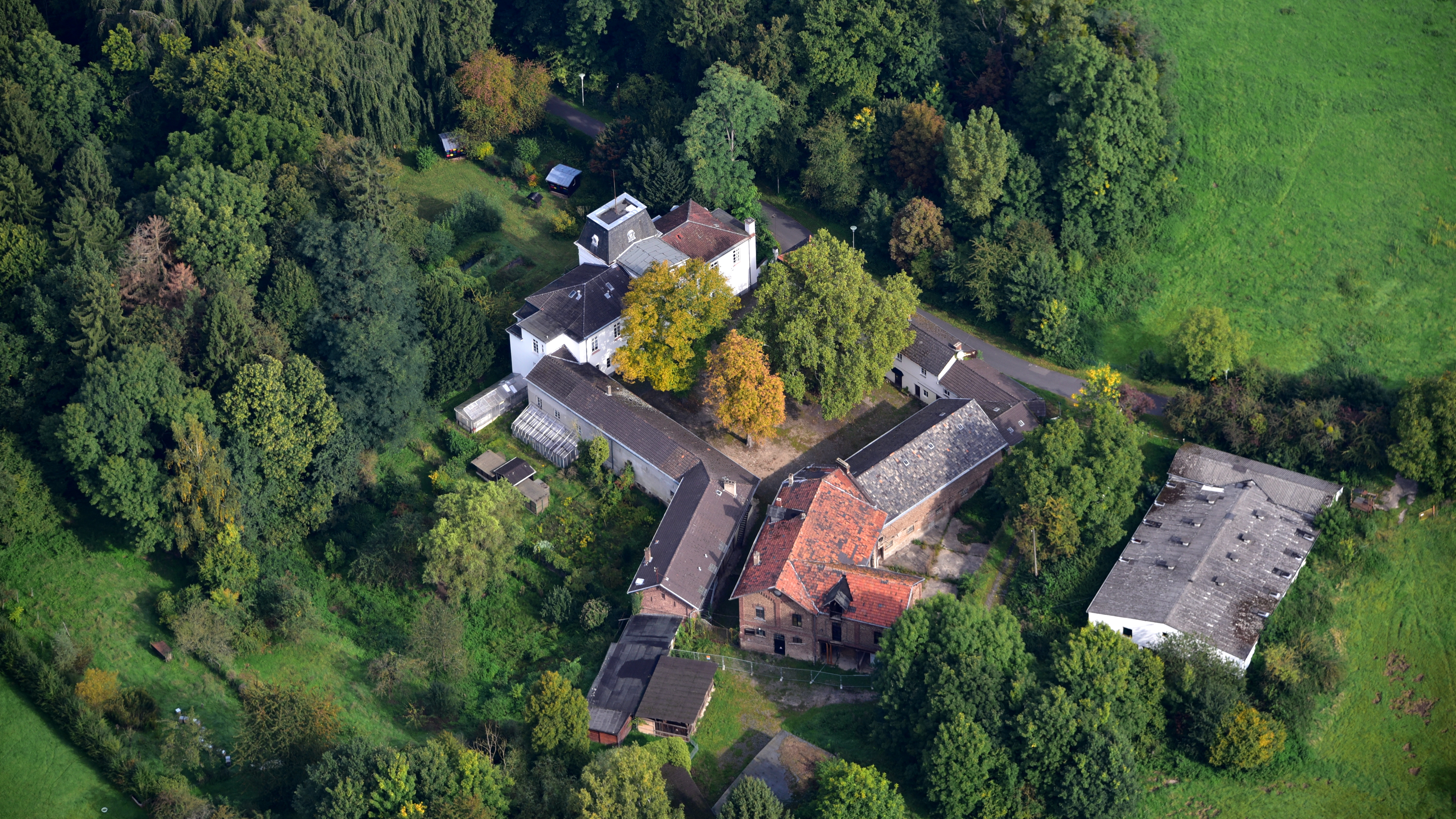 Gut Melb, Luftaufnahme (2017)